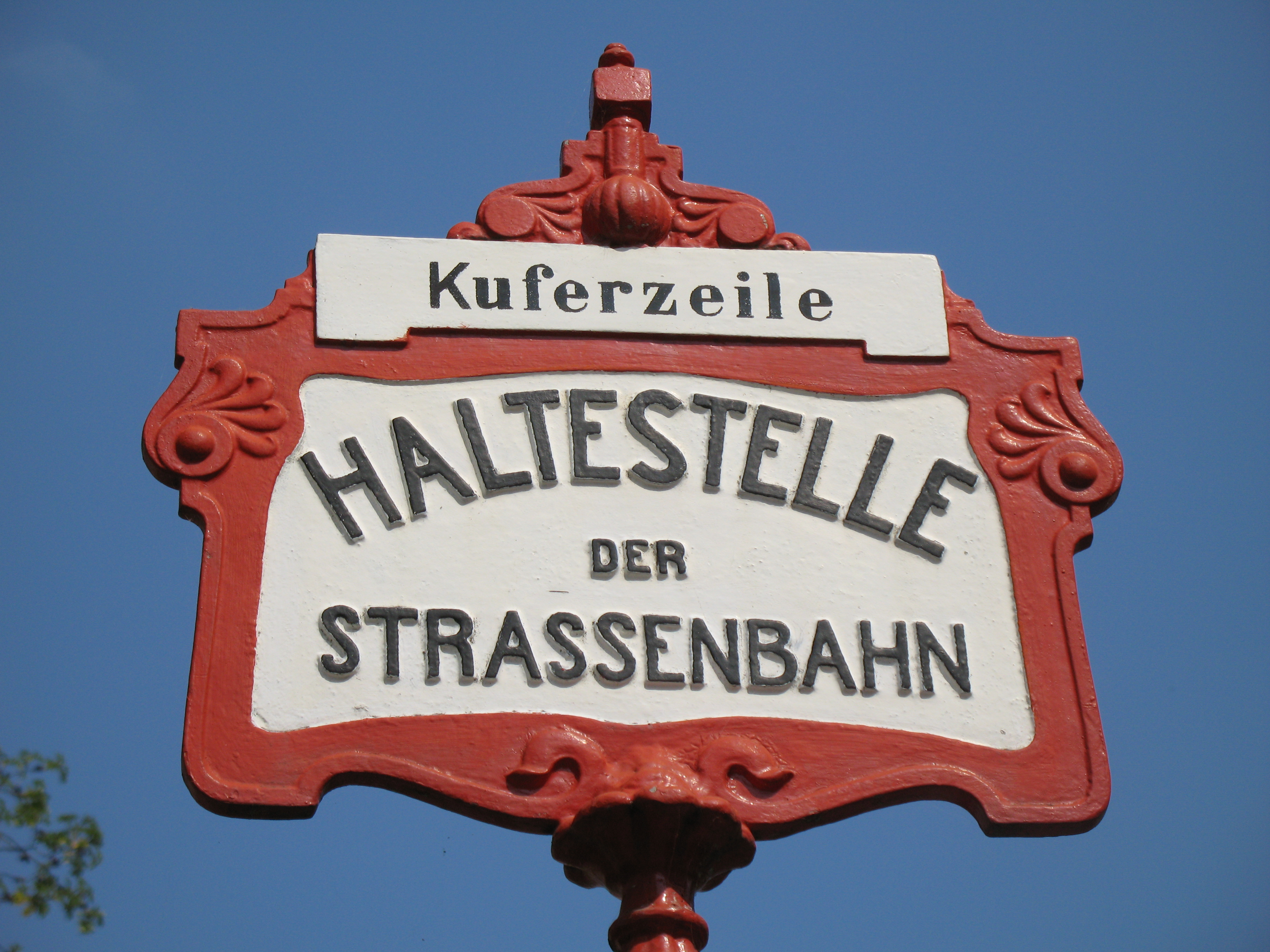 Haltestellentafel der Gmundner Straßenbahn